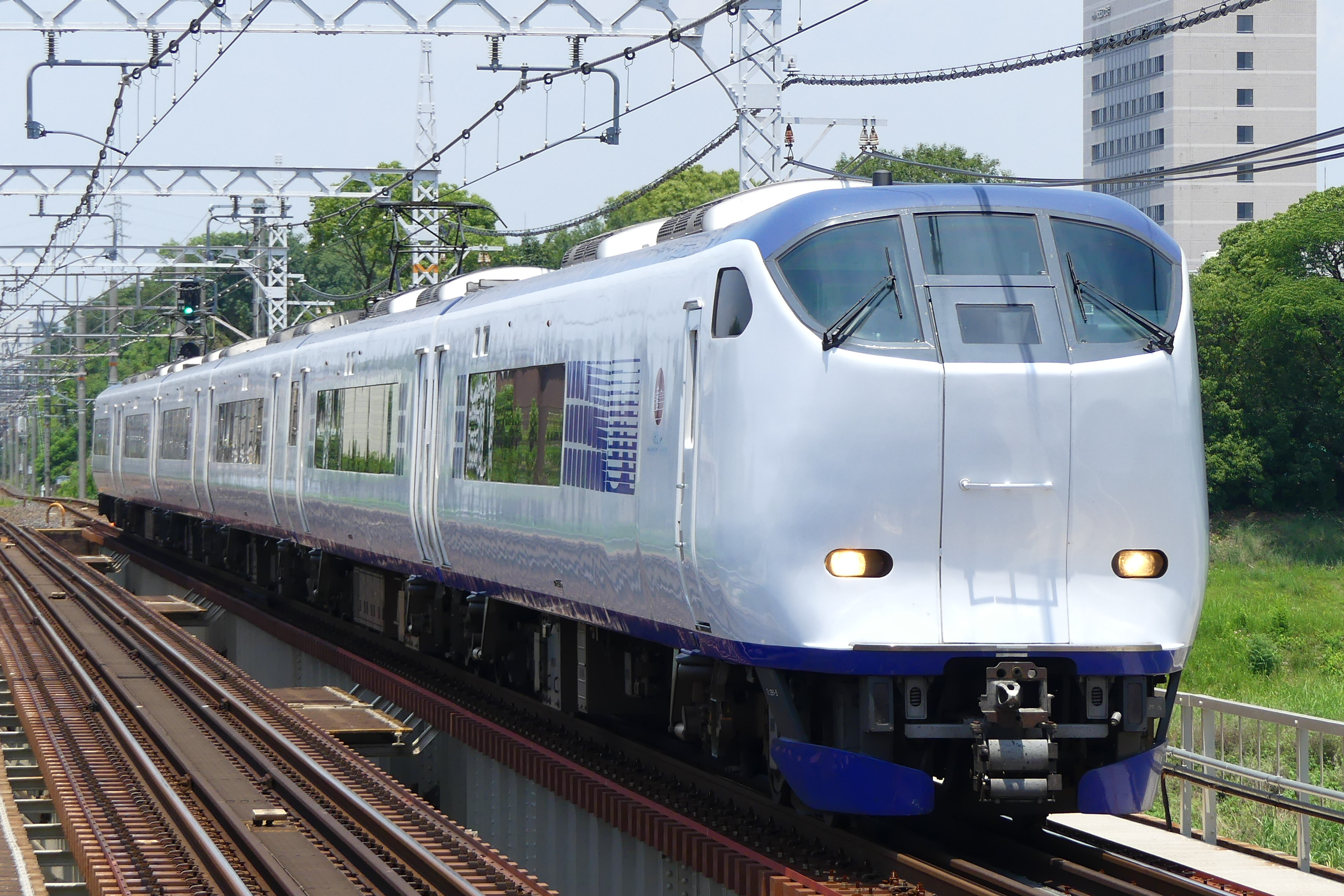 阪和線を走行する281系電車・特急はるか